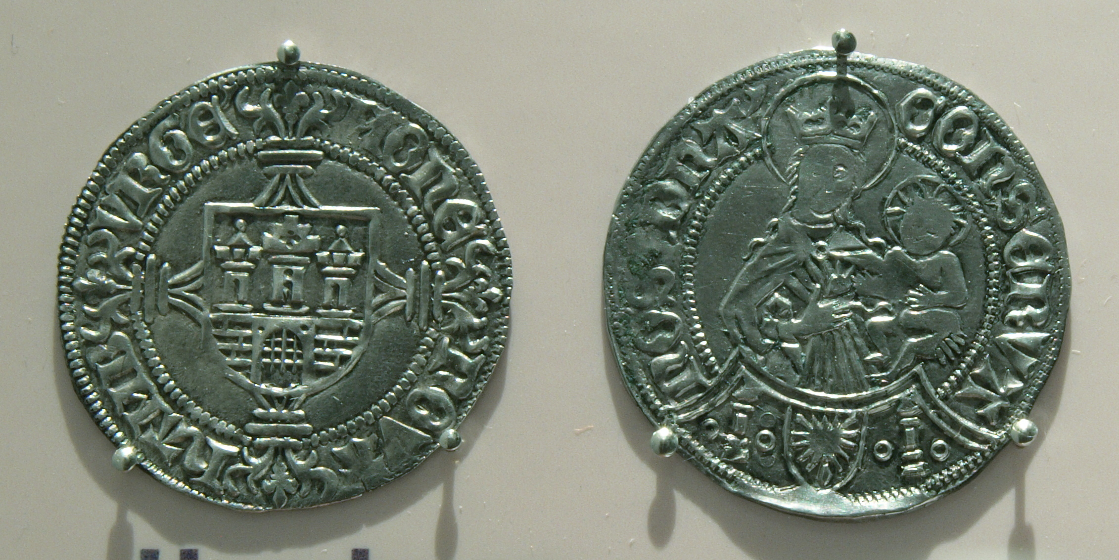 Hamburg Doppelschilling 1468. Photographed at Museum für Hamburgische Geschichte, Hamburg, Germany.